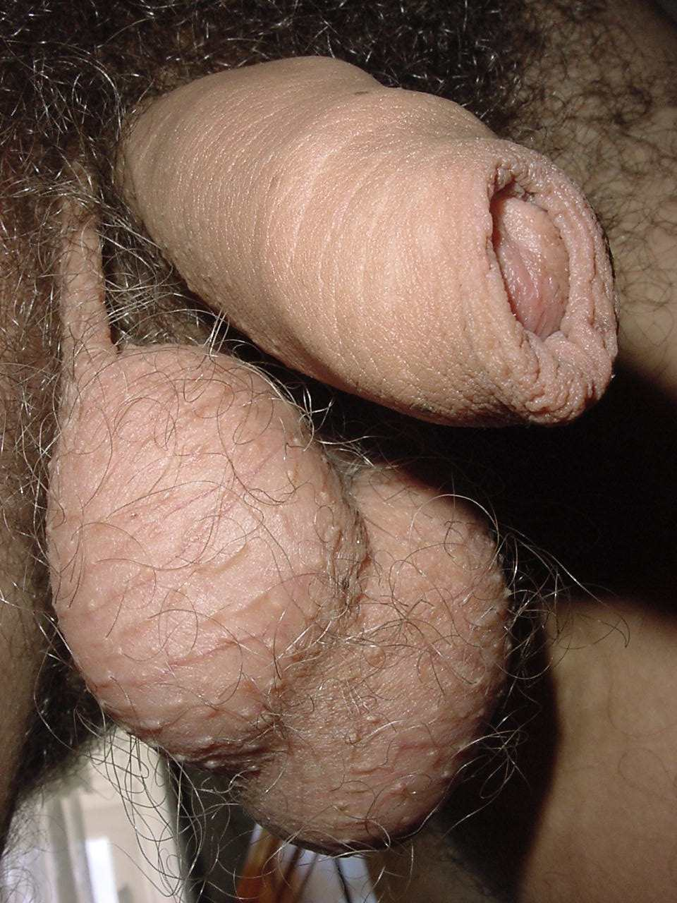 Pénis flácido e escroto com os testículos individualizados